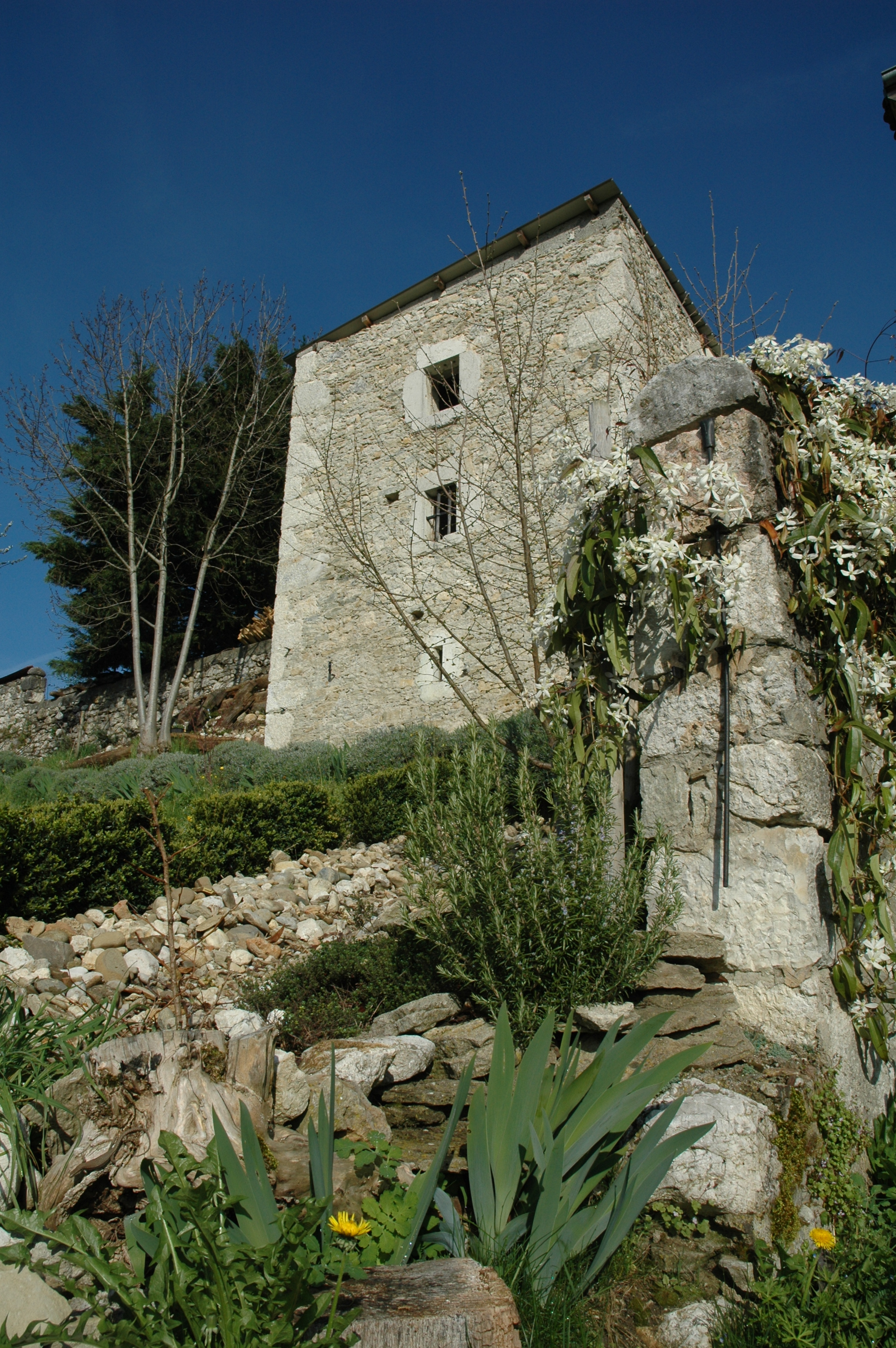 Vue coté Sud du pigeonnier